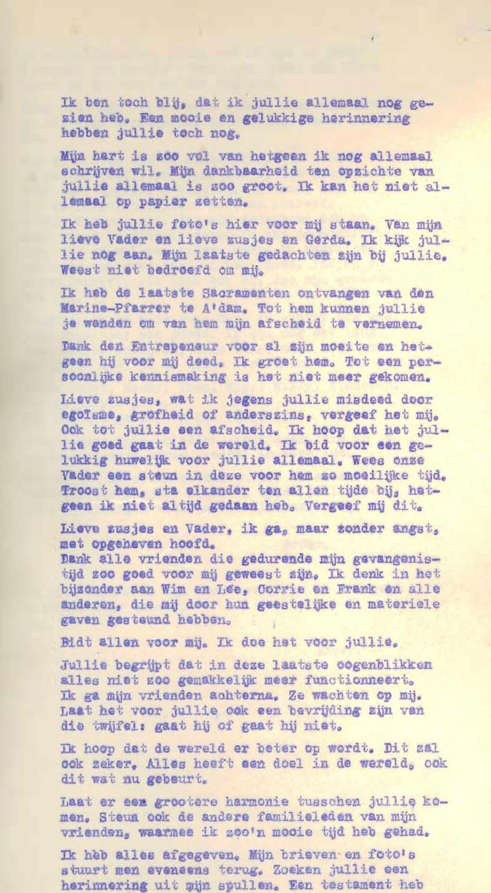 Pagina 2 van de afscheidsbrief Ardien Moonen - 7 aug 1943